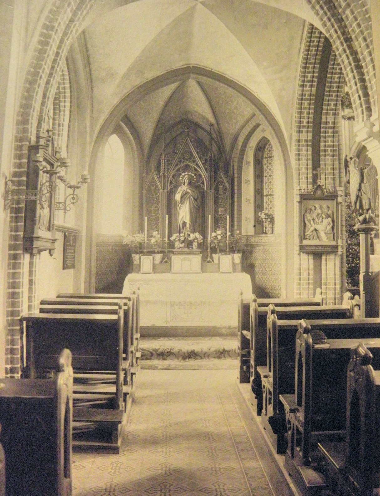 Kirche St. Peter und Paul, Eberswalde. Marienkapelle. Foto um 1910